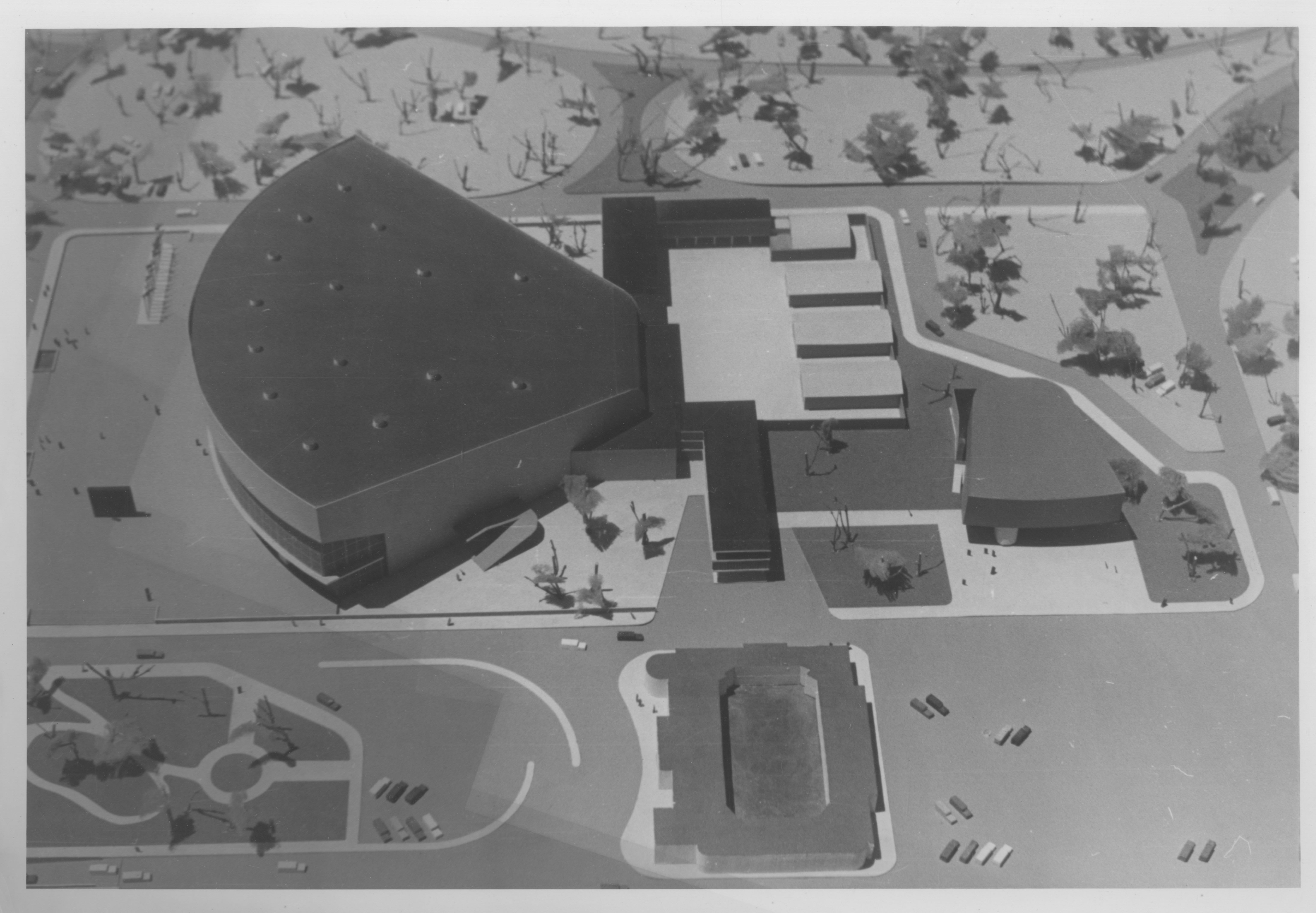 Fotografía antigua de la Ciudad de México resguardadas por el Museo Archivo de la Fotografía (MAF) de la Ciudad de México